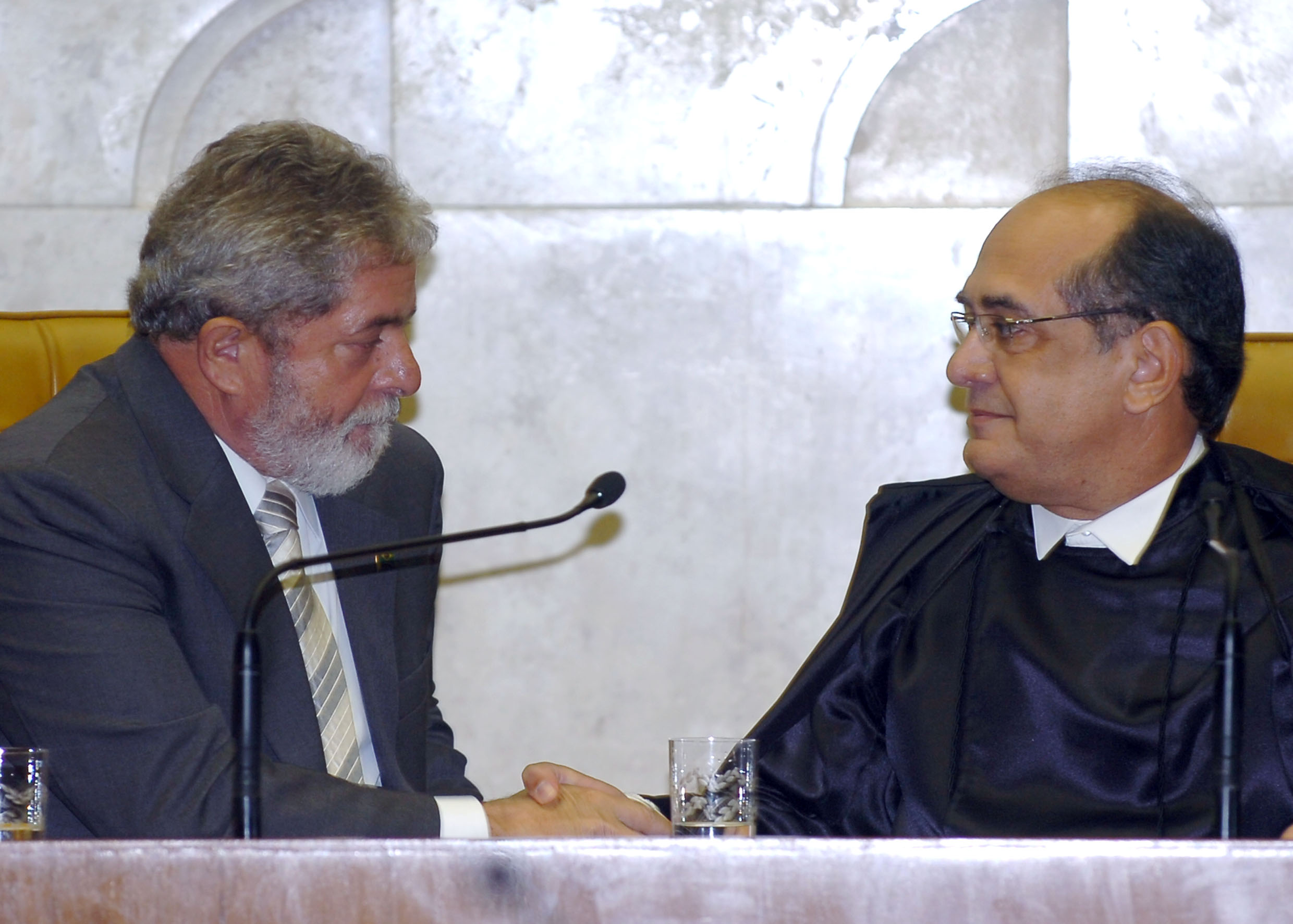 Presidente Lula cumprimenta o novo presidente do STF, ministro Gilmar Mendes, durante a cerimônia de posse